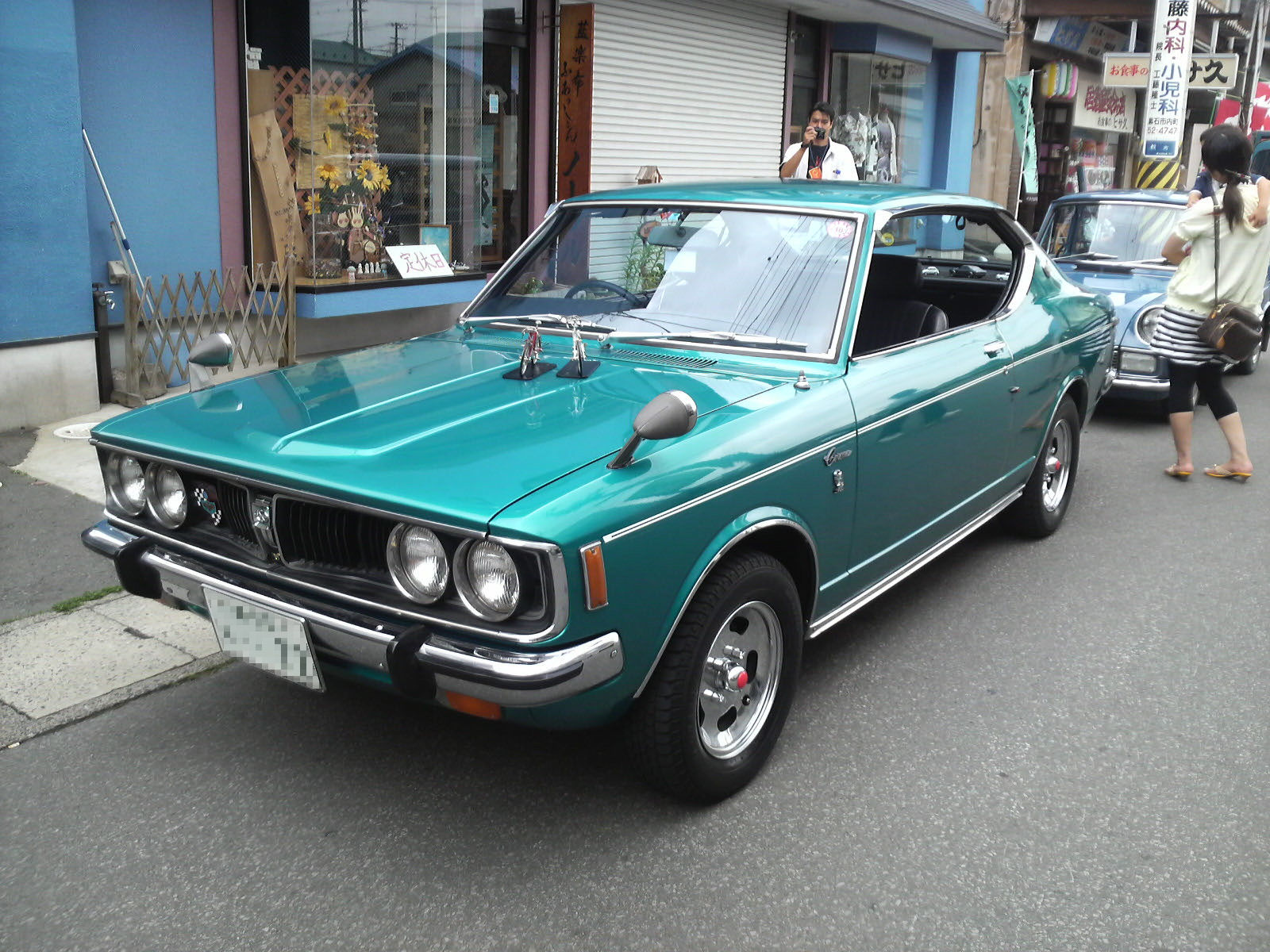 トヨペットコロナハードトップ (RT90)